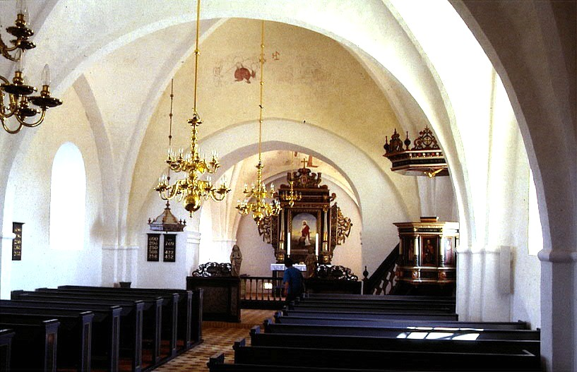 Bjerre Kirke i Danmark. Skibet set mod øst